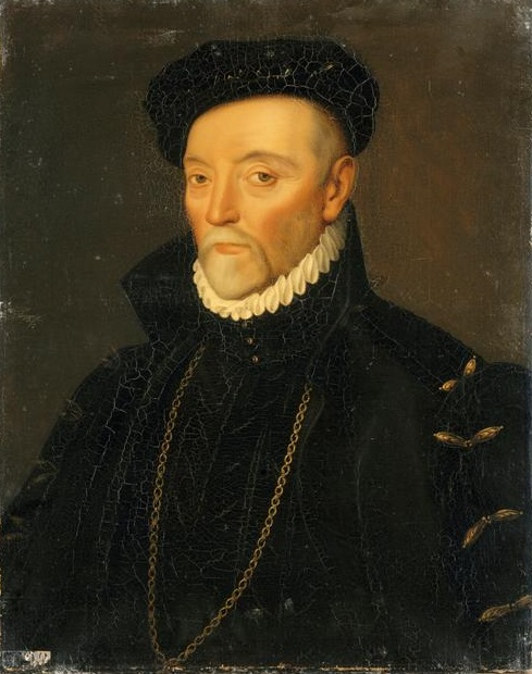 Portrait d'Artus de Cossé-Brissac.